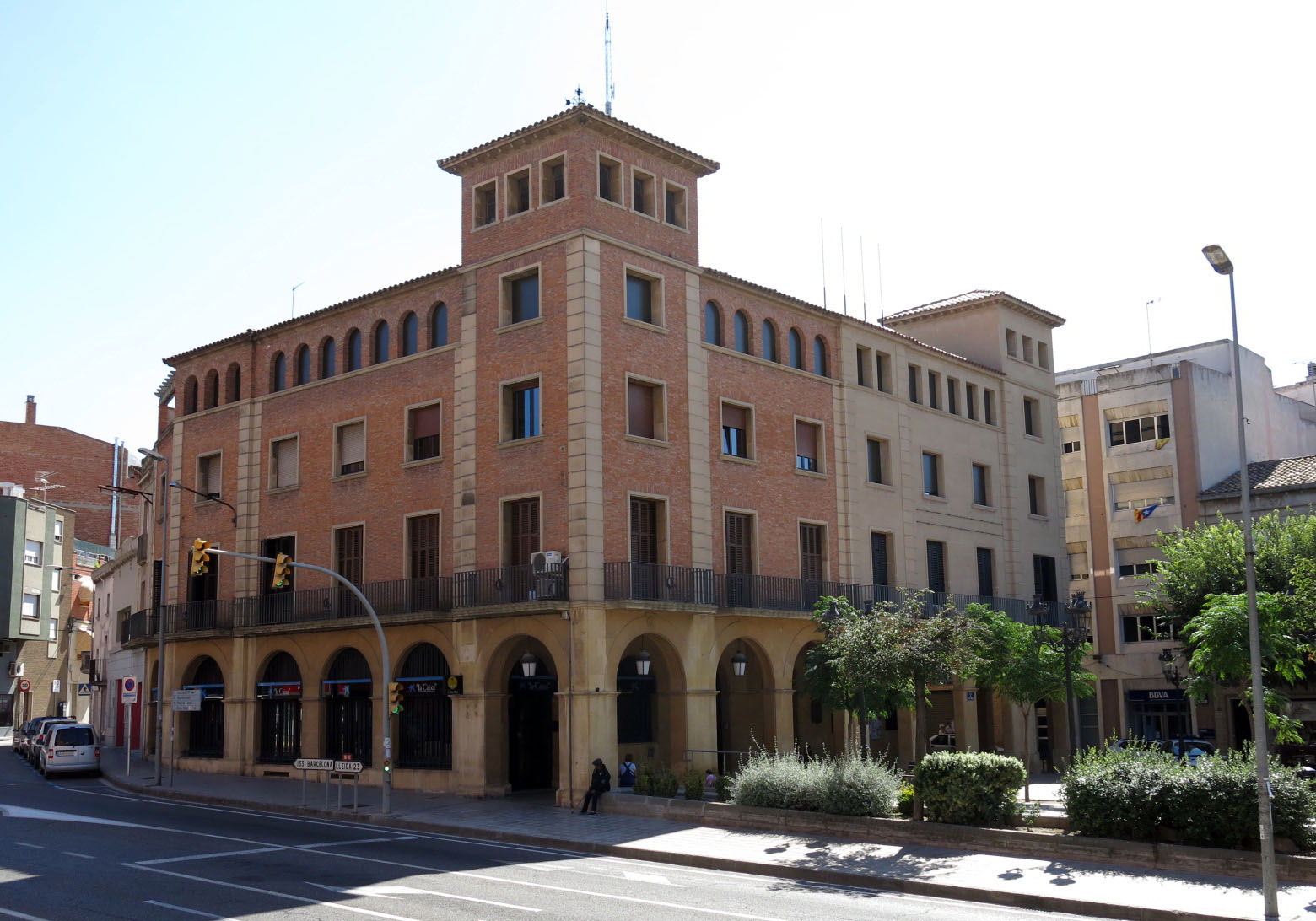 Ajuntament de Mollerussa